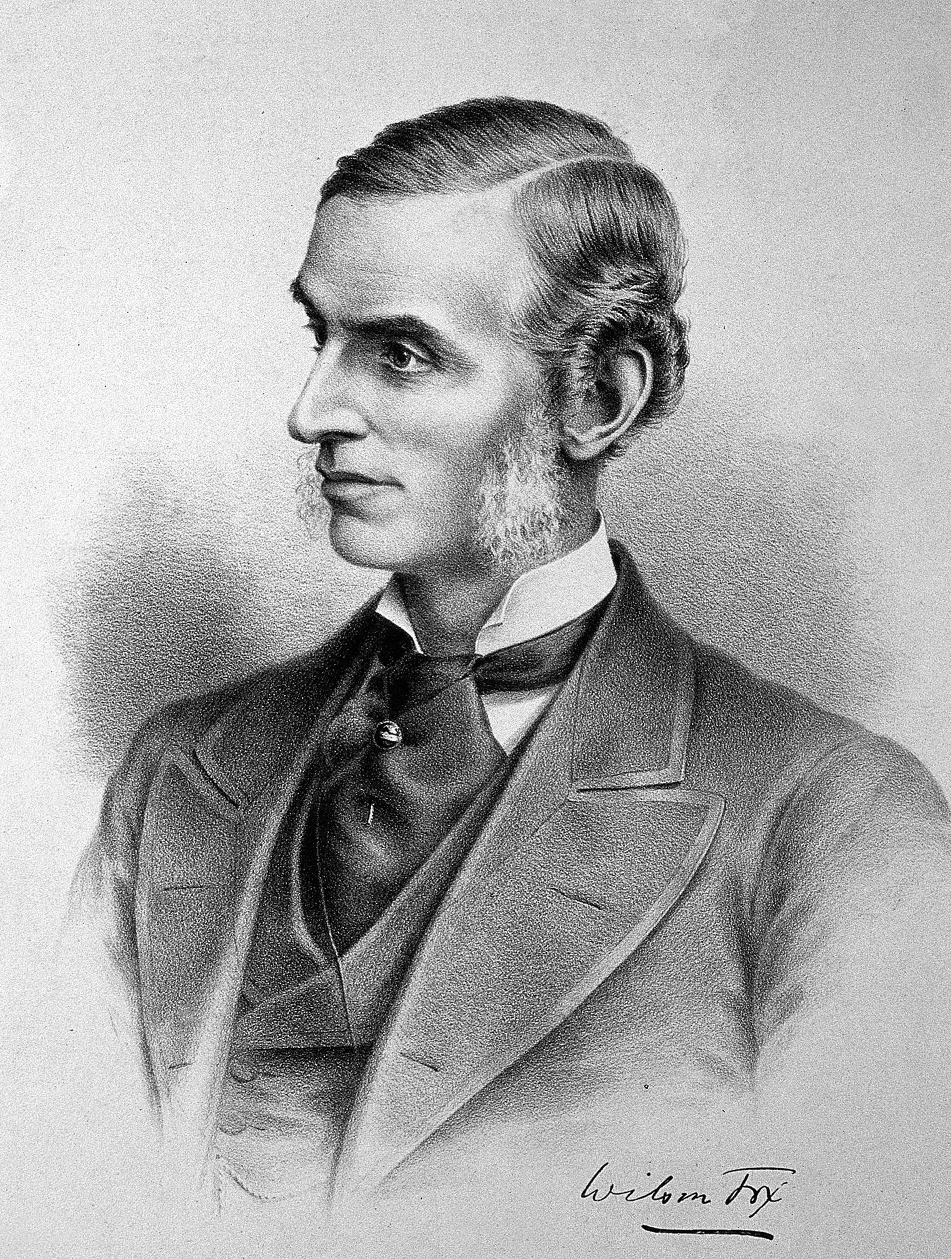 Genre/Technique: Portrait prints. Lithographs. Subject name: Fox, Wilson, 1831-1887.